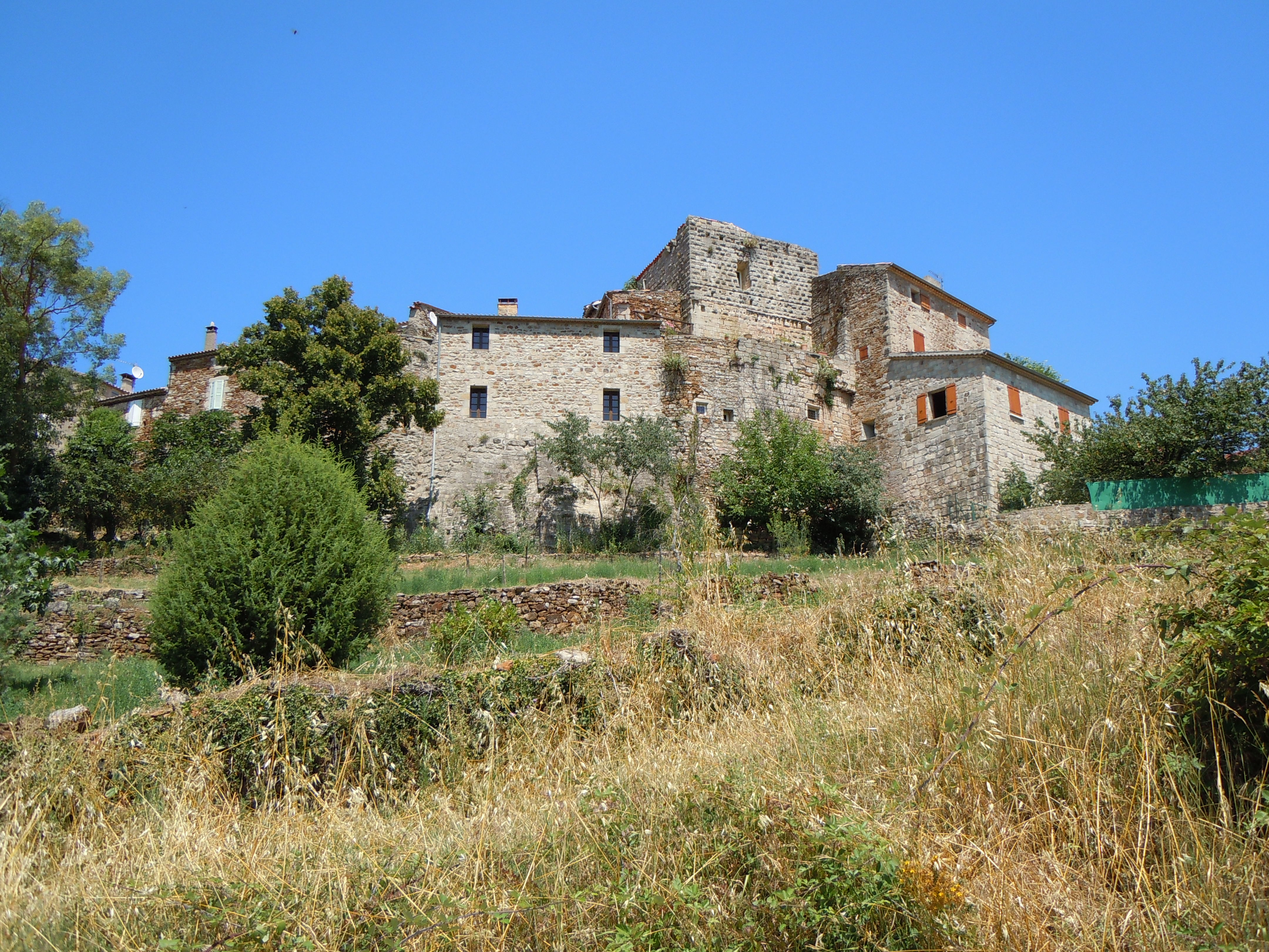 Vinezac : Ardèche - France - Ancien Château de Vinezac